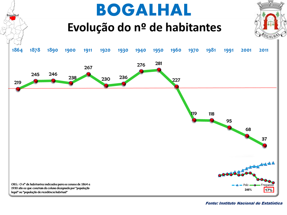 Censos 1864/2011